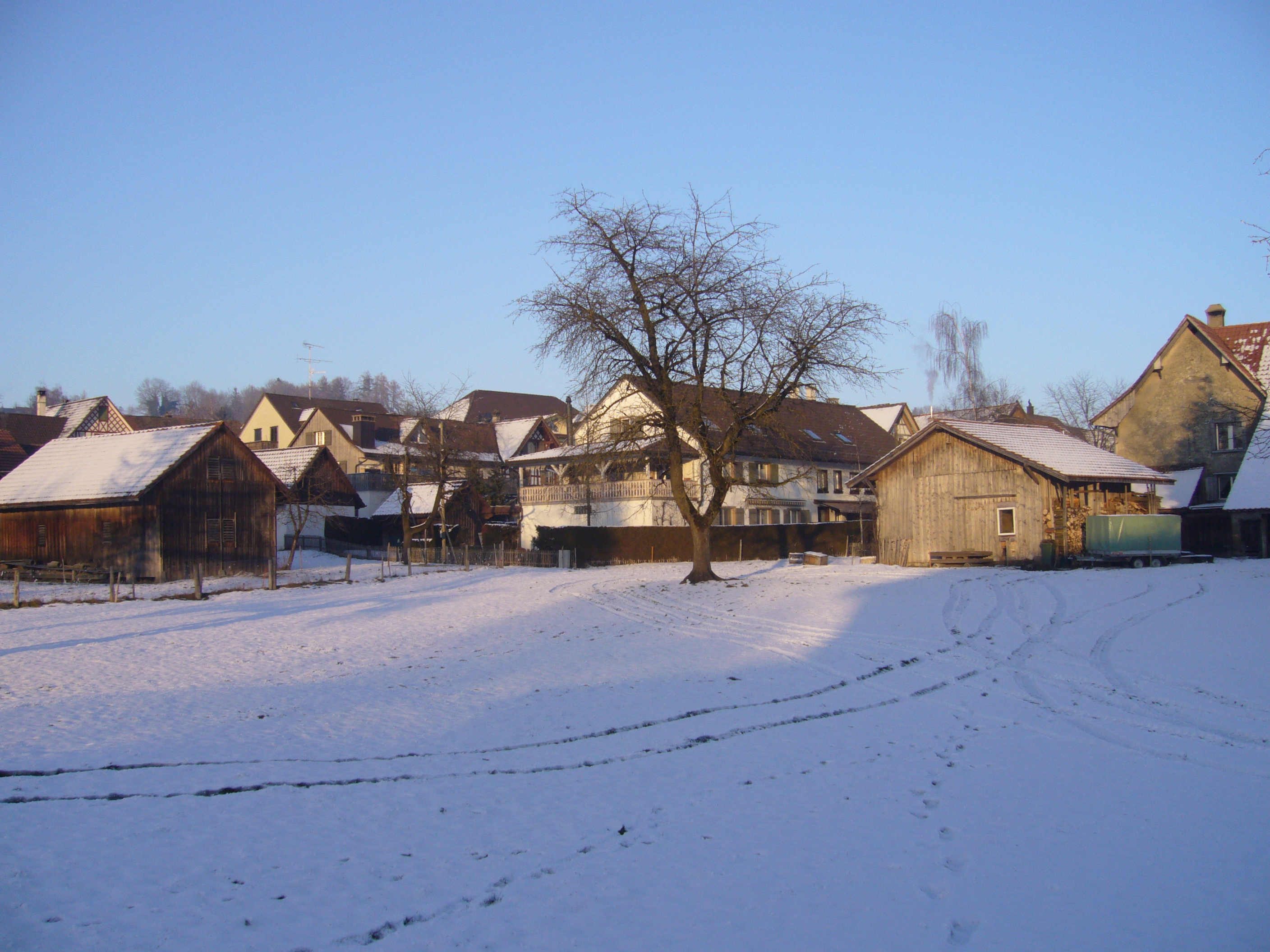 Blick von der Hauptstraße zur Dorfmitte von Thundorf hin.